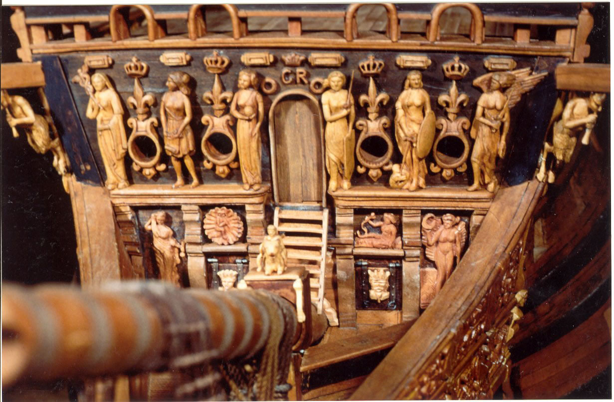 Description=Royal Sovereign - Fronteau de coltis babord Source=photo de l'auteur - avec son autorisation Author=Arthur Molle [1] Permission= avec la permission de l'auteur - with author permission